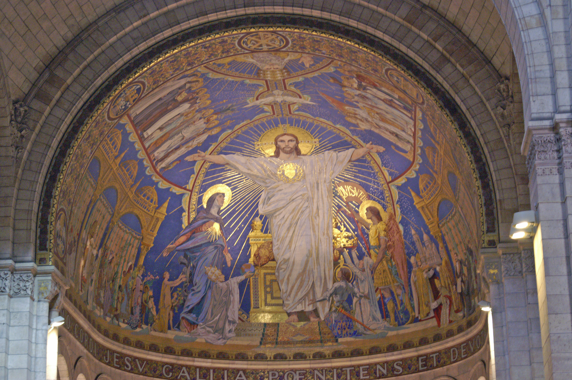 Basilique du Sacre Coeur, Mosaique de l'abside, 1923. Basilica of the Sacré Cœur - Apse's mosaic, 1923.